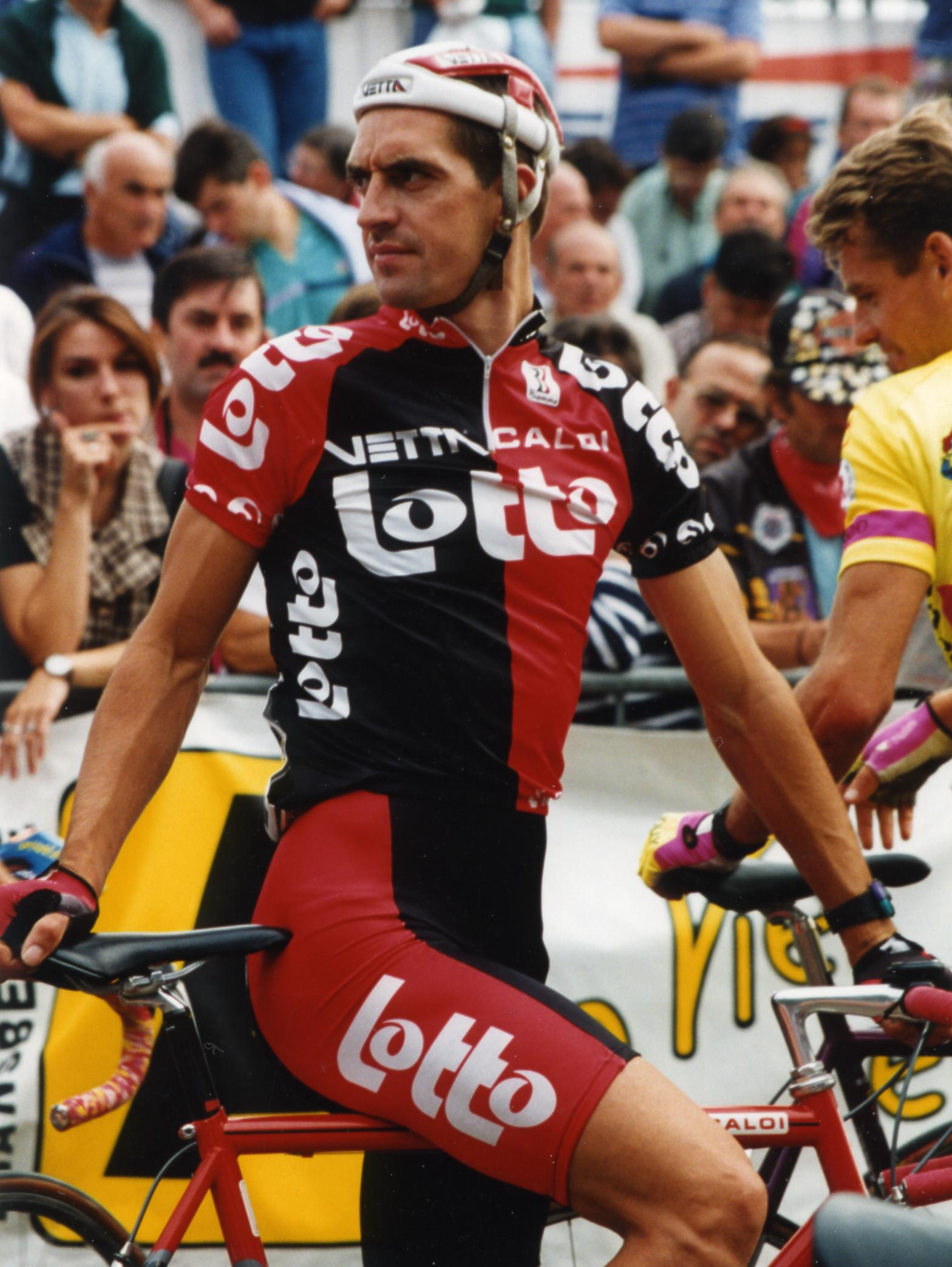 Critèrium de LEVES